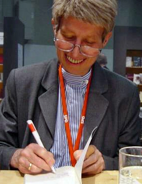 Regine Hildebrandt wenige Tage vor ihrem Tod beim SPD-Bundesparteitag in Nürnberg 2001